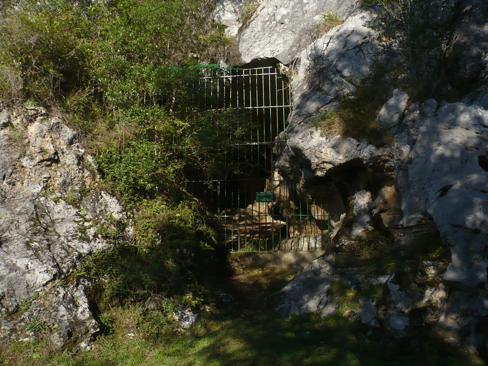 Entrada a la Cueva de La Pasiega. Posee interesantes pinturas de animales y signos.